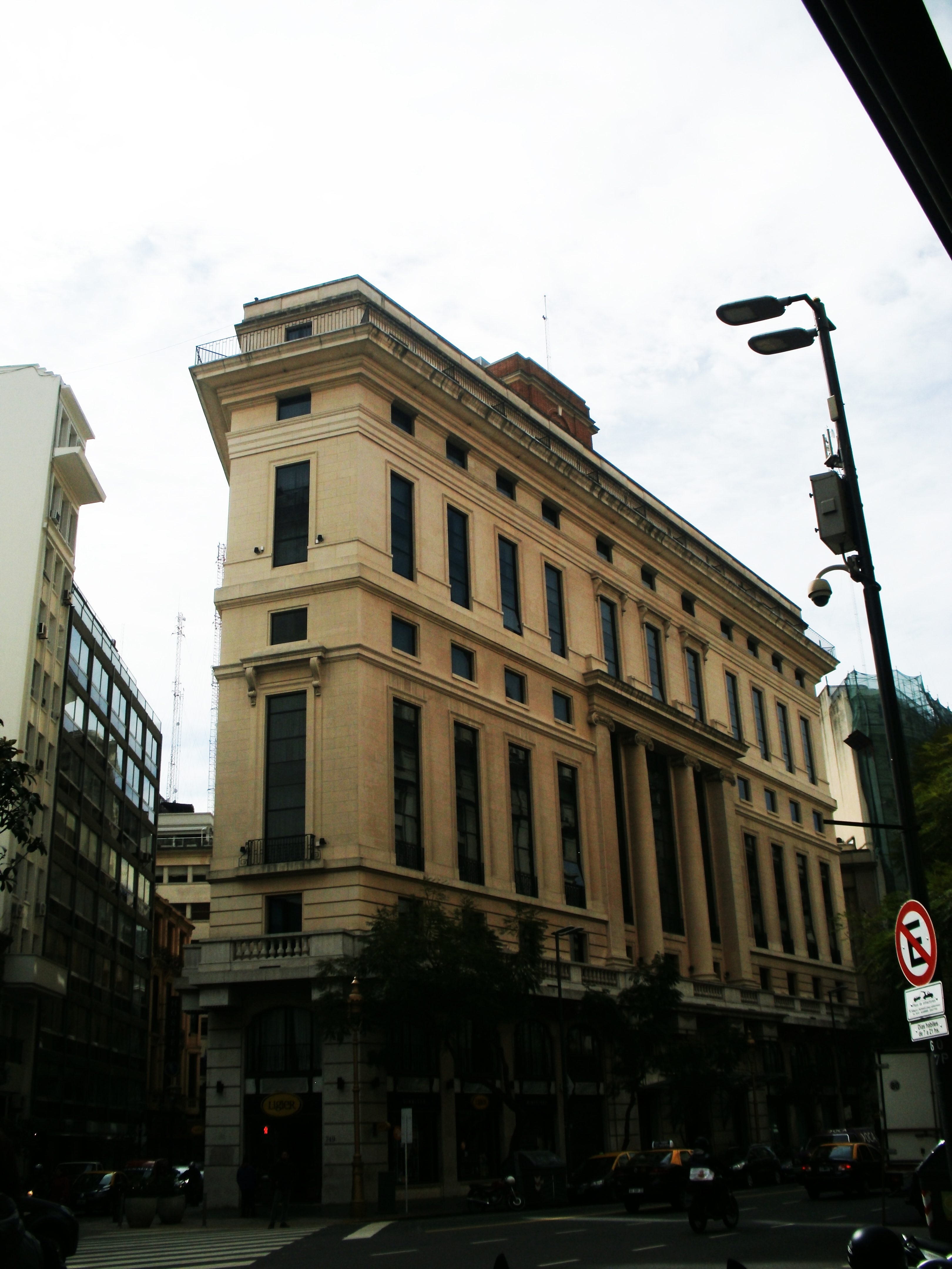 Imagen del Hotel Continental, tomada para un trabajo de la Facultad de Arquitectura, Diseño y Urbanismo, de Buenos Aires.